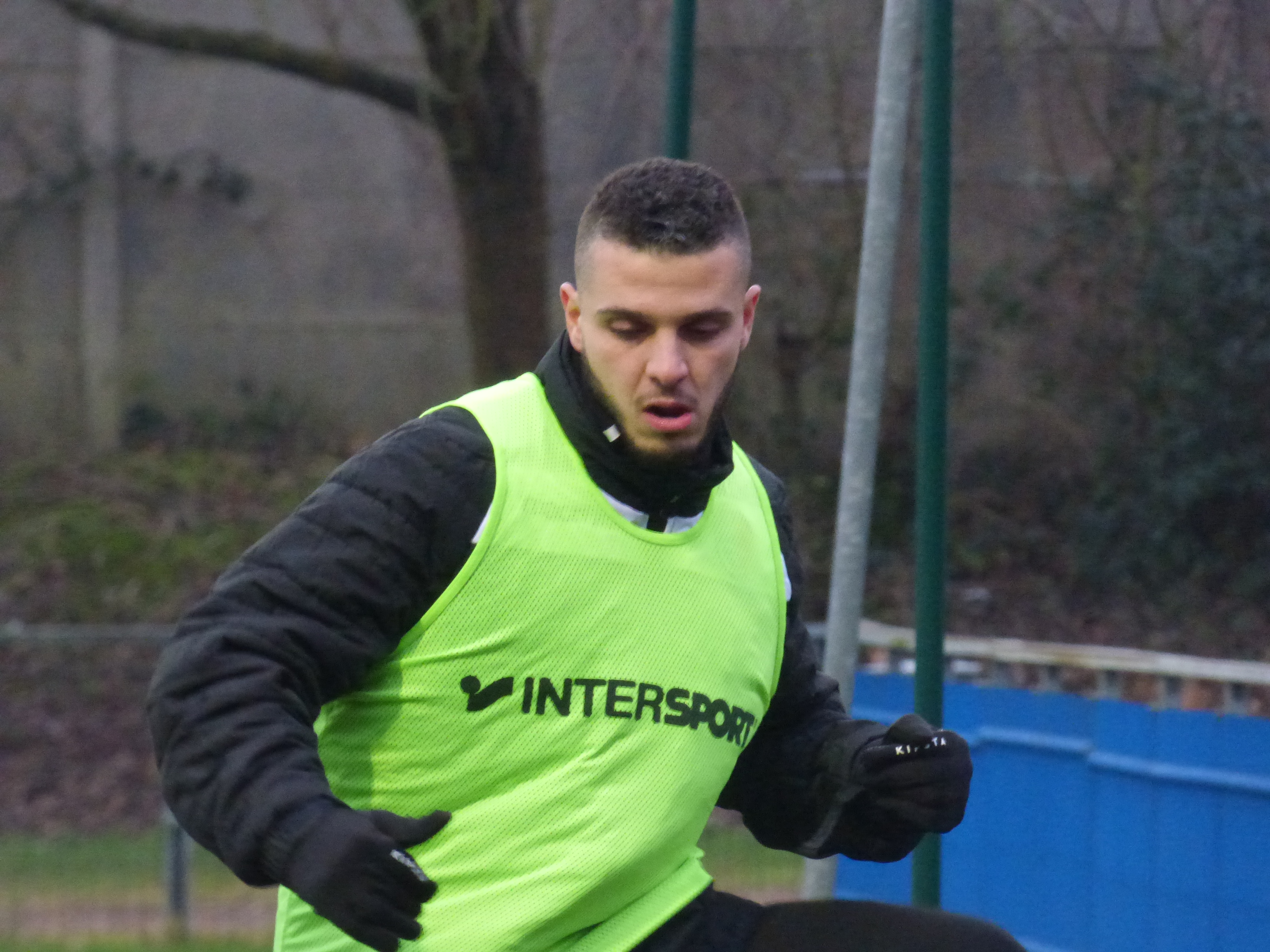 Yassin Chadili lors du match Lens B / Sedan, comptant pour la quatorzième journée du Championnat de France de football de National 2 (4ème division française) 2017-2018 au Stade François-Blin d'Avion le 27 janvier 2018.